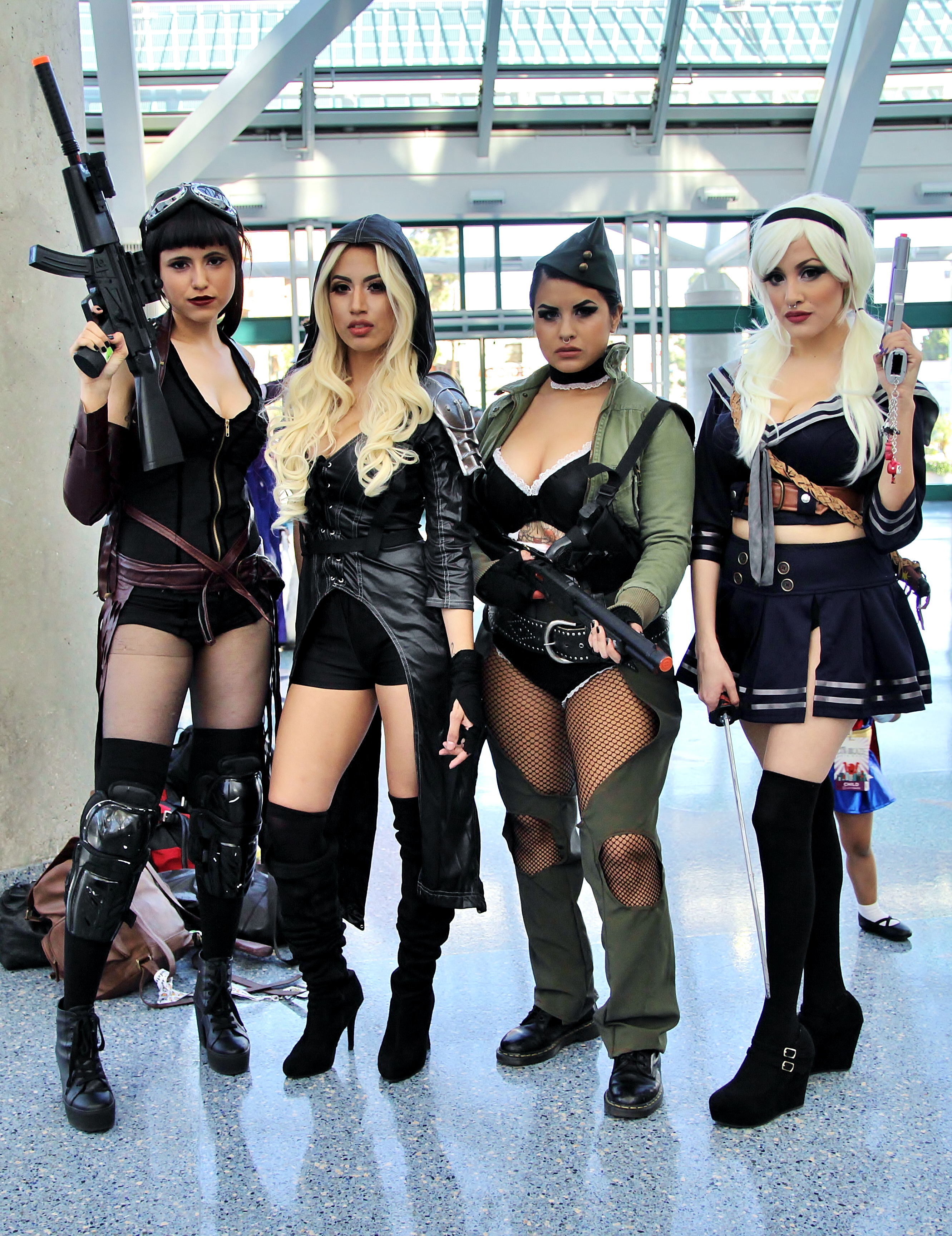 Cosplay at Comikaze Expo 2015.